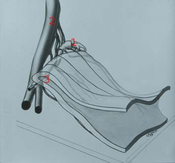 Modellrekonstruktion der Beziehung des N. buccalis zur Anlage des Juxtaoralen Organs, W. Zenker